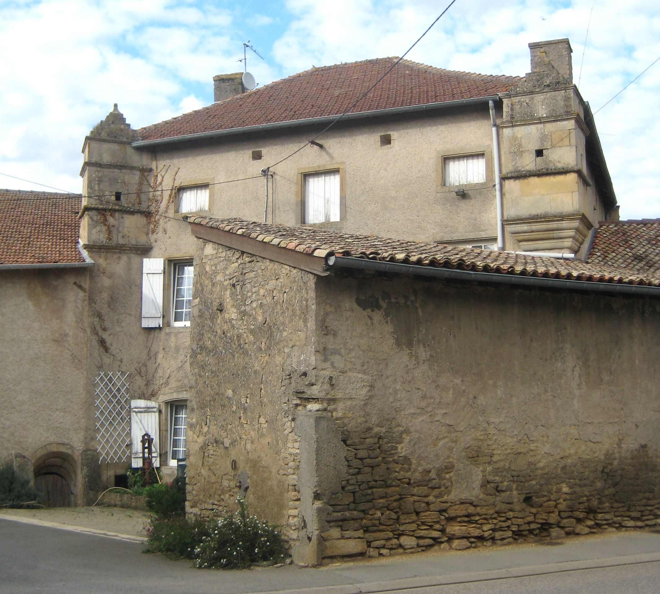 Description maison forte Hatrize maison forte Hatrize